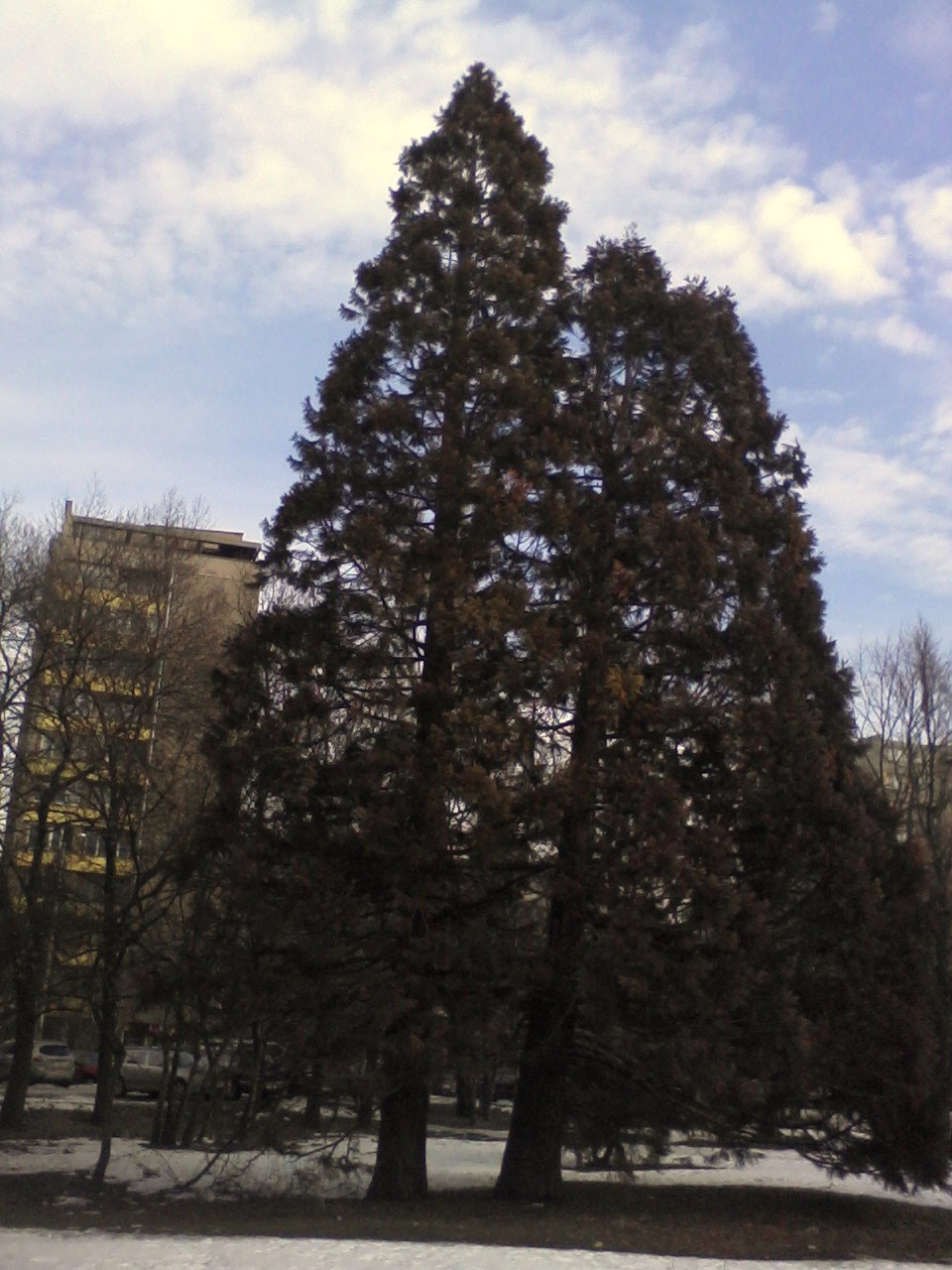 Гигантска секвоя до входа на Южния парк в София